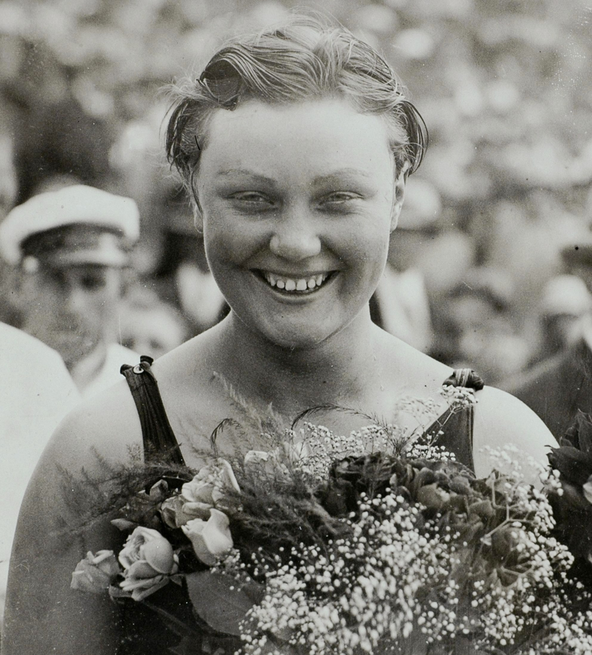 Sport. Olympische Spelen Amsterdam 1928 : De Duitse zwemster Hildegard Schrader, eerste op de 200 m schoolslag.